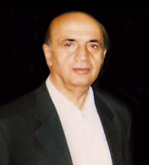 Manoochehr Keymaram